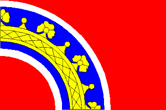 Vlajka obce Nový Oldřichov